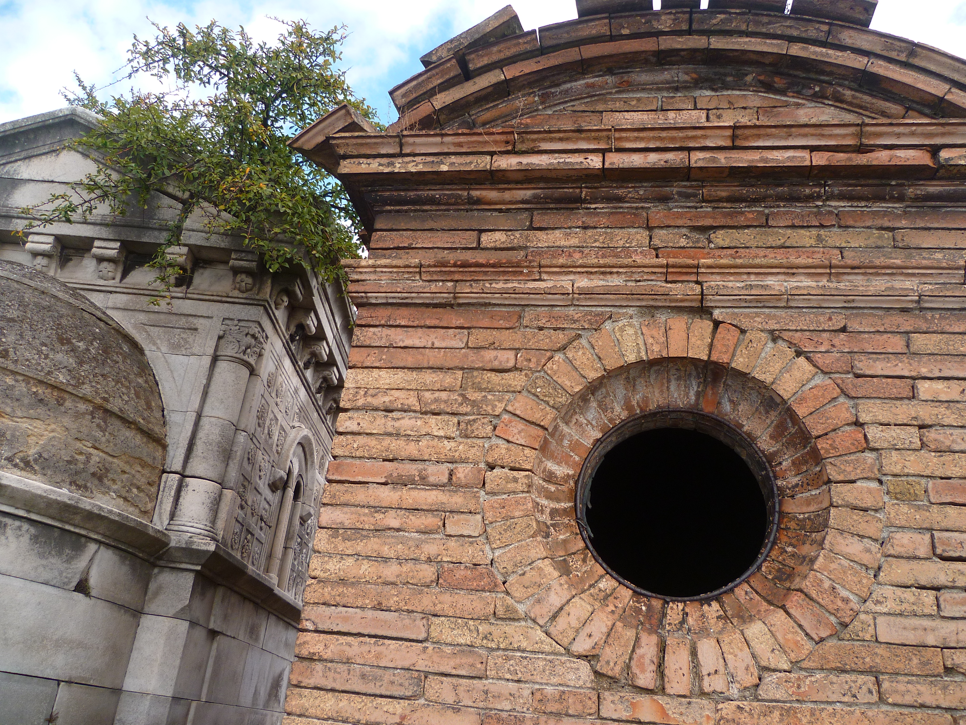 Toulouse (Haute-Garonne, France) : Mausolées à Terre Cabade.